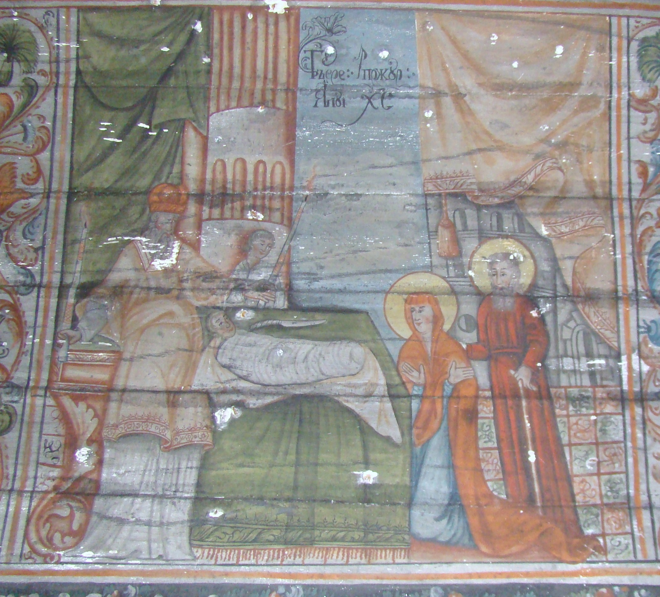 Biserica de lemn din Osoi